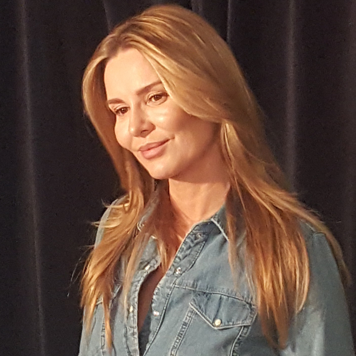 Polska dziennikarka i prezenterka telewizyjna Hanna Lis w październiku 2017 roku.